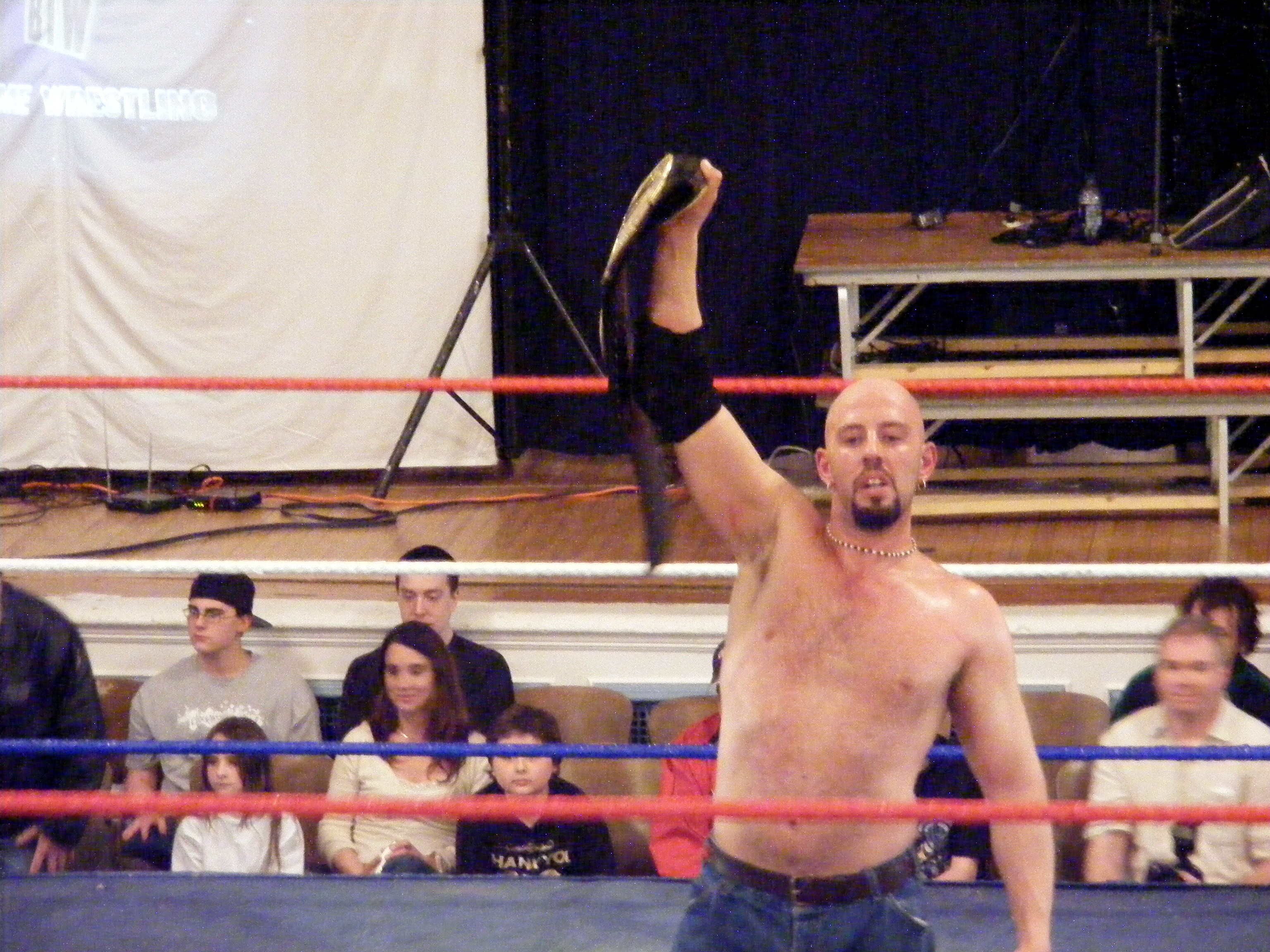 Peter Polaco as champ.